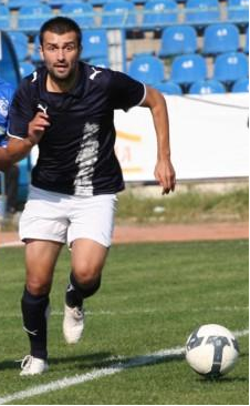 Марко Илич